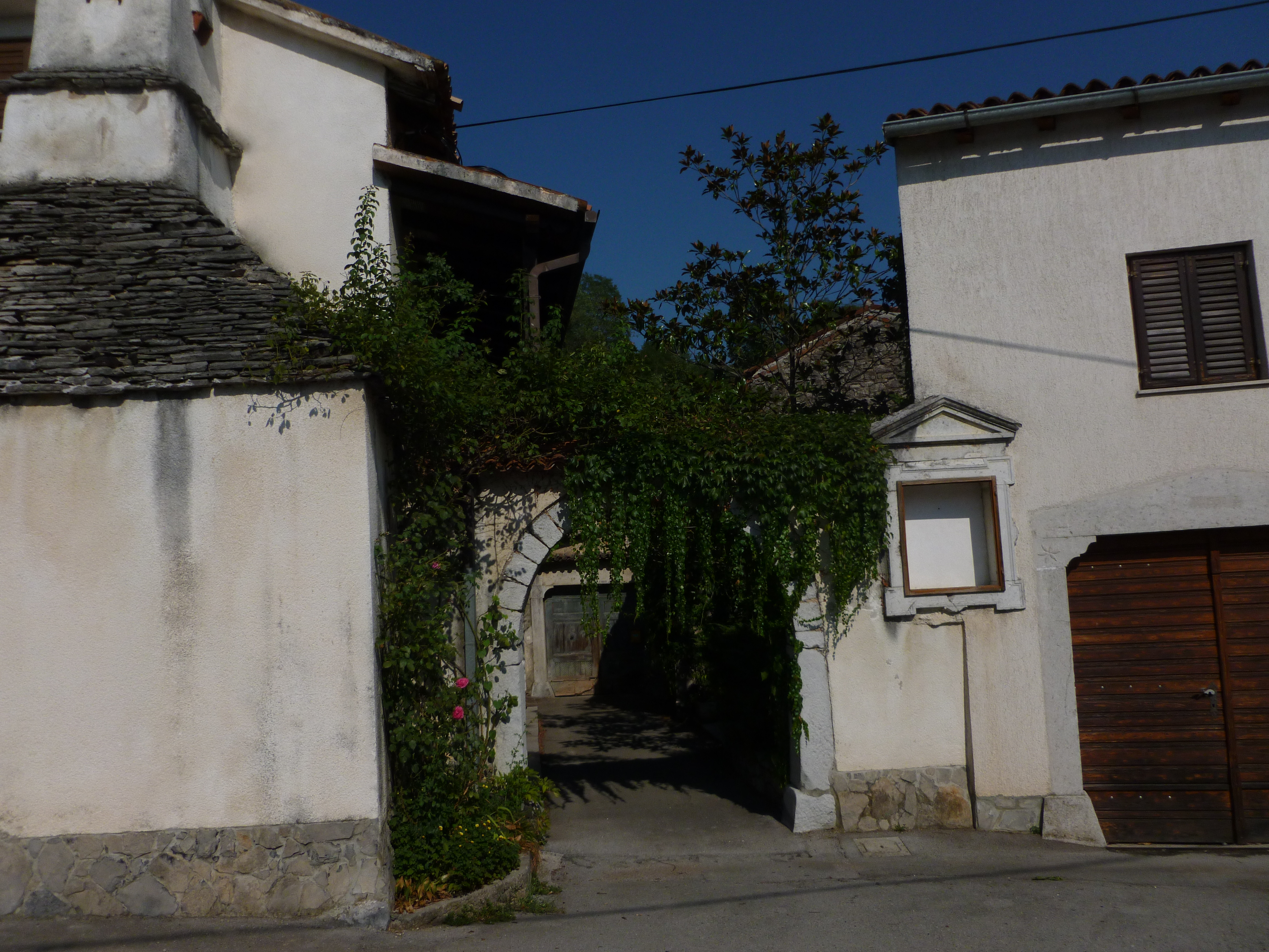 in Kobdilj, Slovenia